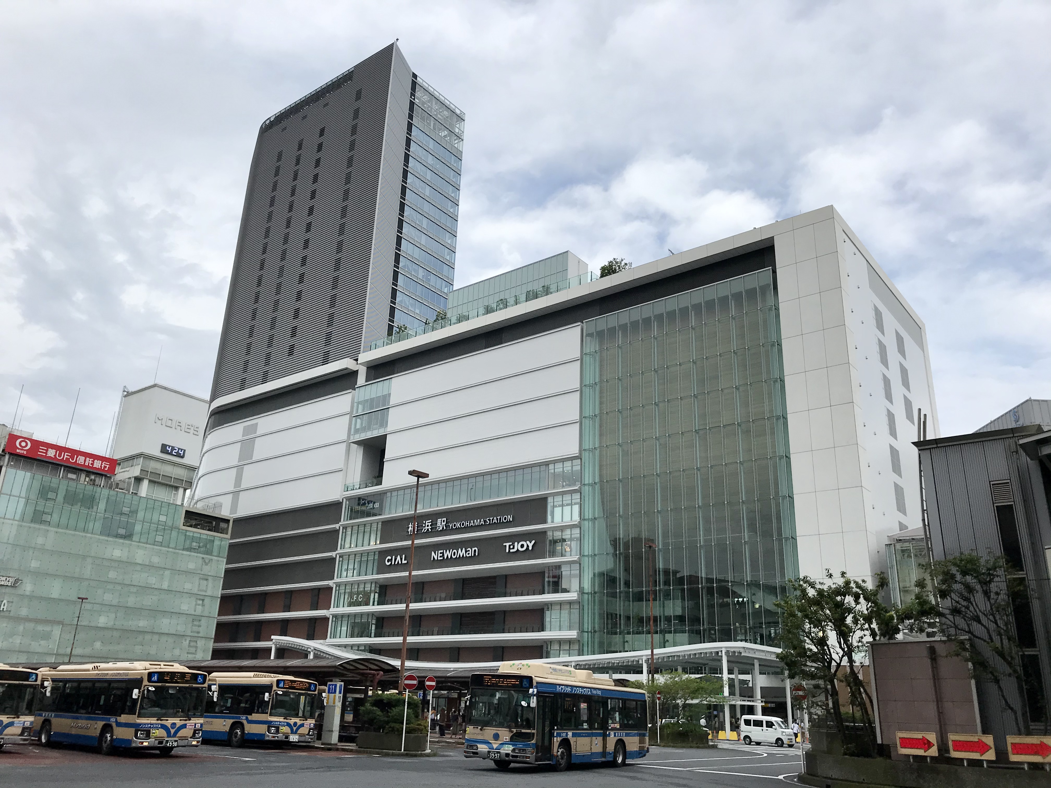 JR東日本横浜駅西口駅ビル